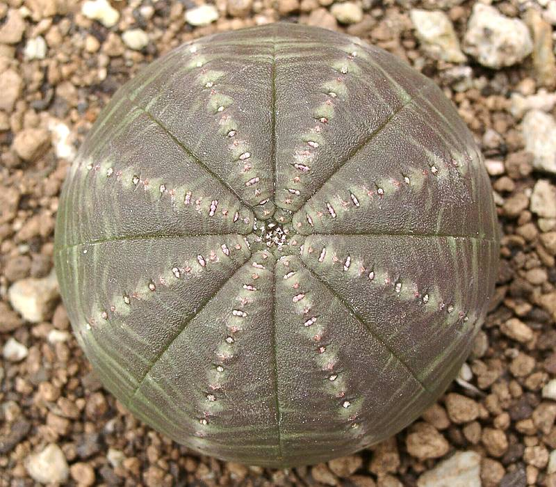 Euphorbia obesa ssp. symmetrica